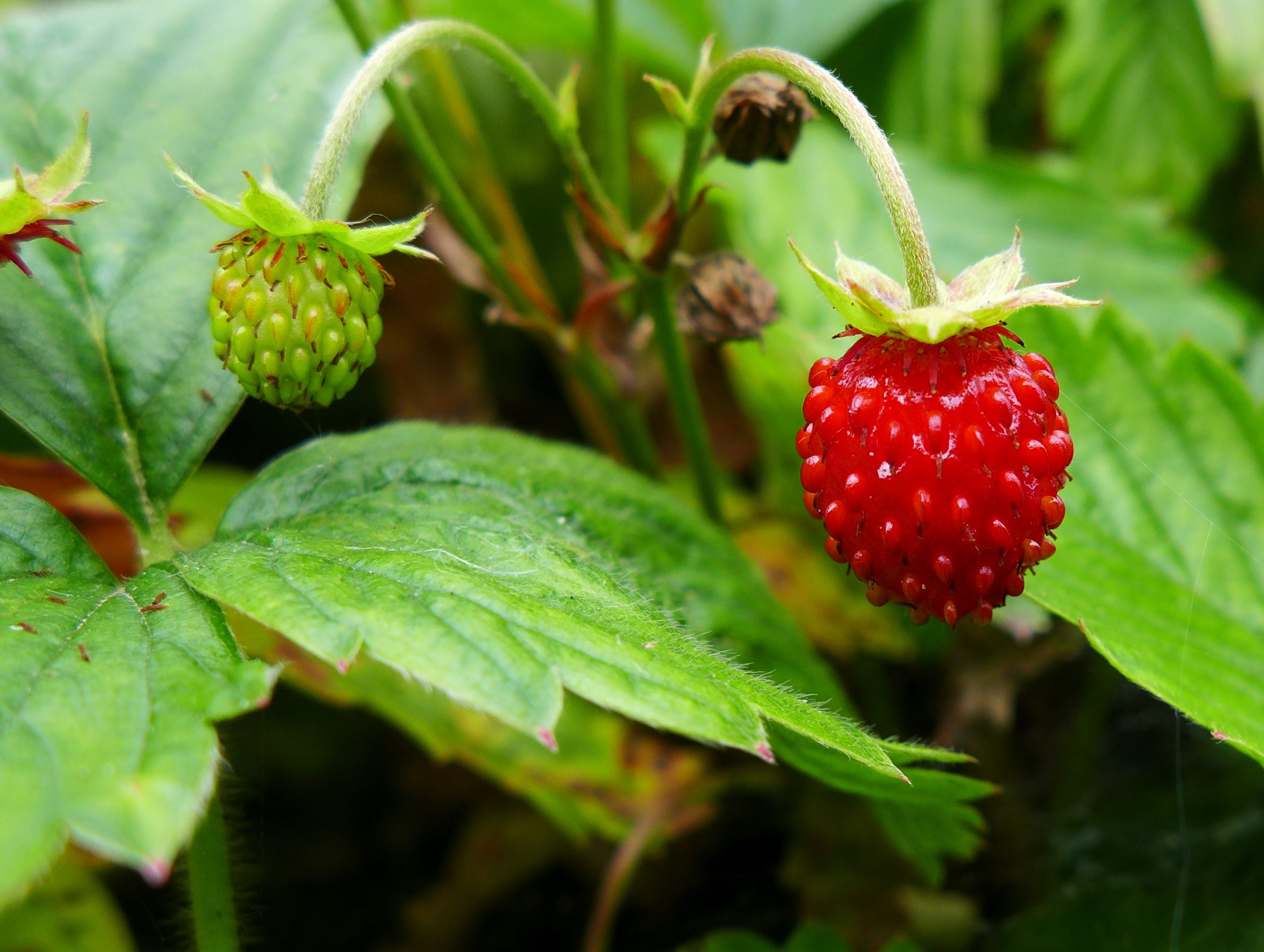 Walderdbeeren im Juli 2013 in der Lüneburger Heide, Niedersachsen, DE. Eine reife Frucht, eine unreife Frucht.